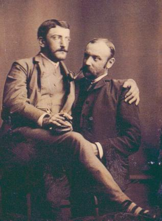 Affectionate Male Valentine Couple, ca. 1890, USA